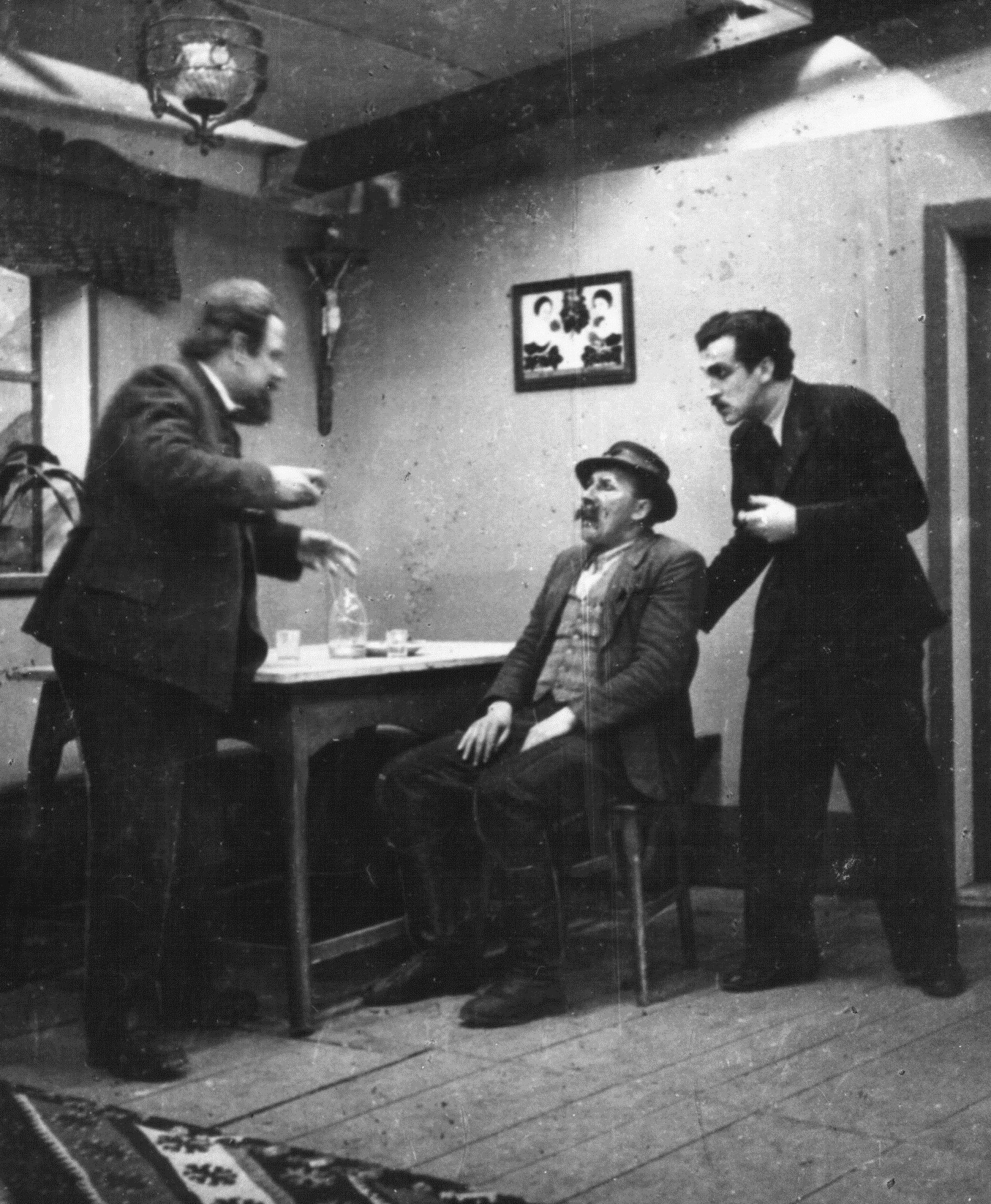 Gledališka predstava Kralj na Betajnovi v izvedbi Slovenskega narodnega gledališča v Črnomlju